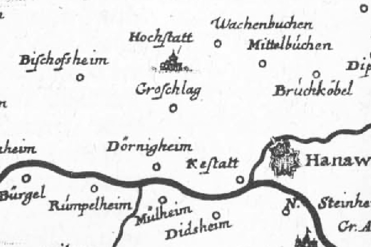 Ausschnitt aus der Merianschen Wetterau-Karte mit der Dorfwüstung Groschlag